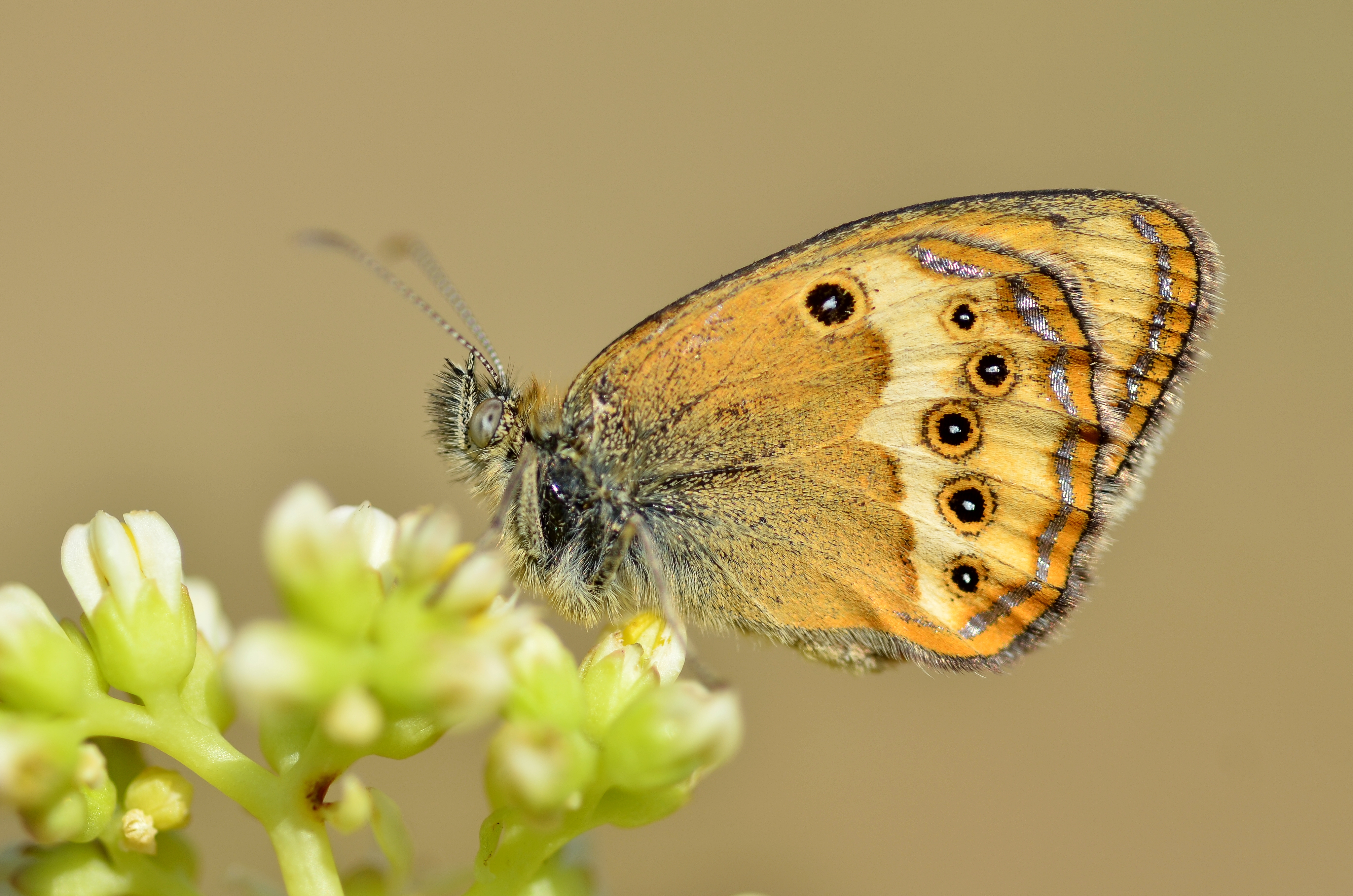 Coenonympha dorus